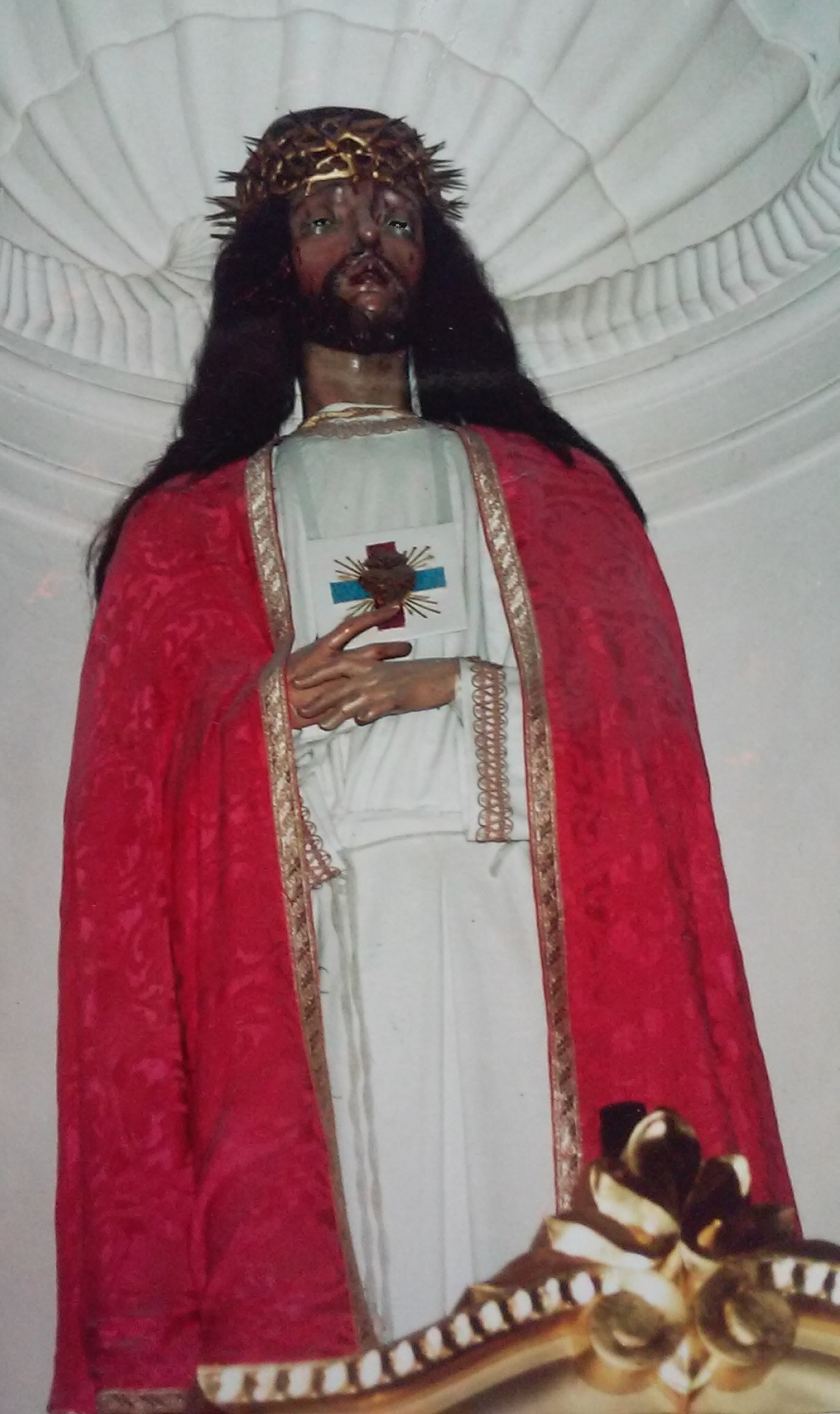 Figura Chrystusa Nazareńskiego czczonego przez trynitarzy, znajdująca się w kościele św.św. Piotra i Pawła w Wilnie. Chrystus ma wyjątkowy Szkaplerz Trójcy Świętej, połączony z Odznaką Serca Jezusowego.